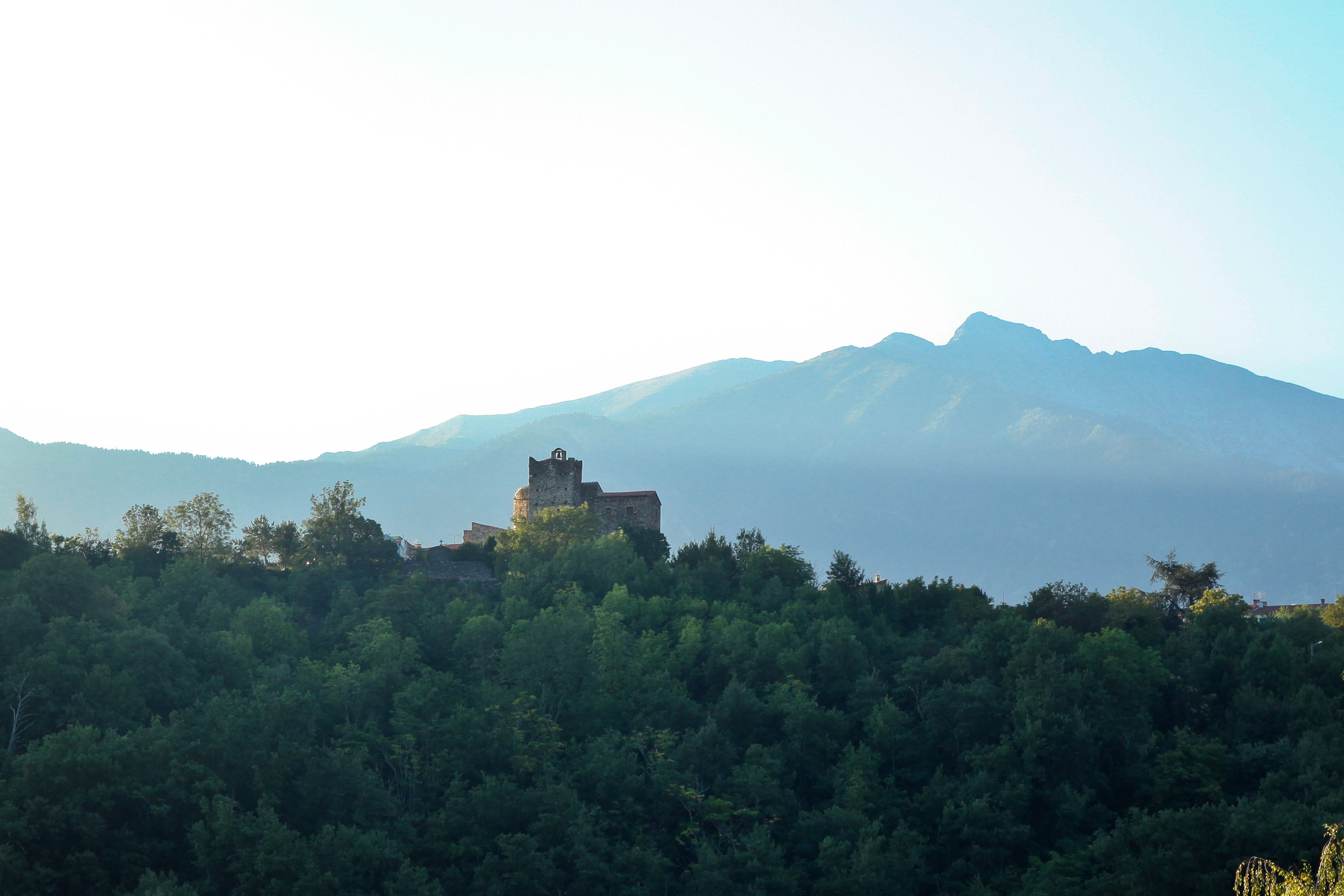 Église Saint Clément de Sirach, face au Canigou